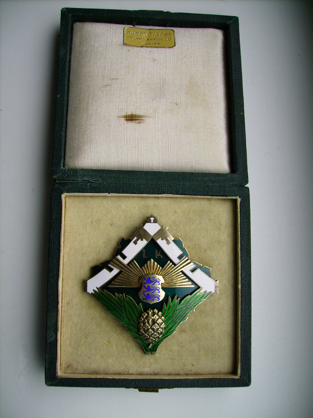 Looduskaitsemärk, 1. järk